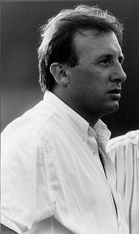 L'allenatore di calcio italiano Alberto Zaccheroni alla guida del Baracca Lugo sul finire degli anni 80 del XX secolo.